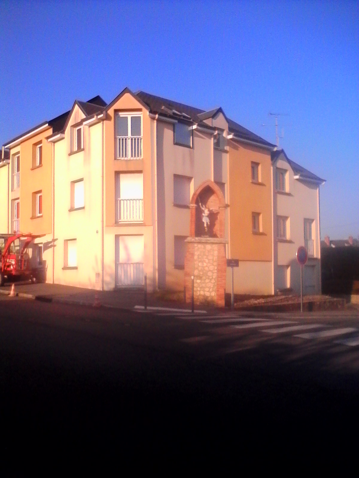 Statue de Saint Michel dans la cote Henri Monduit à Evreux